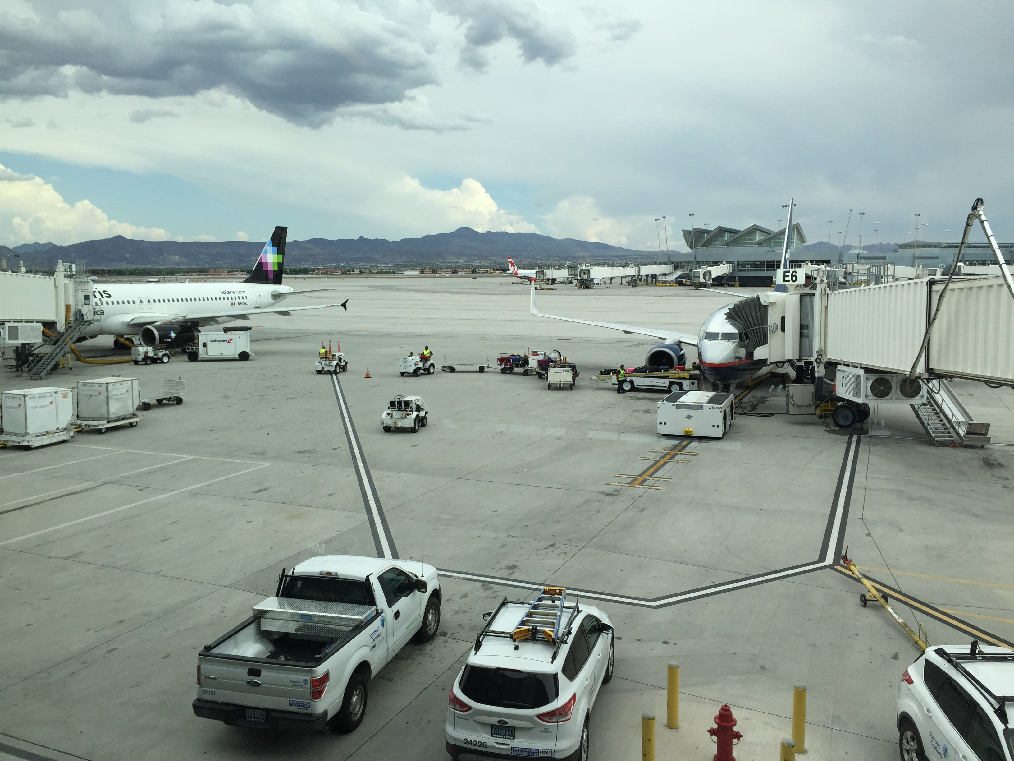 Aviones de Aeroméxico y Volaris en la Terminal 3 del Aeropuerto Internacional de Las Vegas.